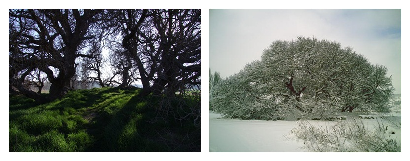 Moral nevado, Villovela de Esgueva